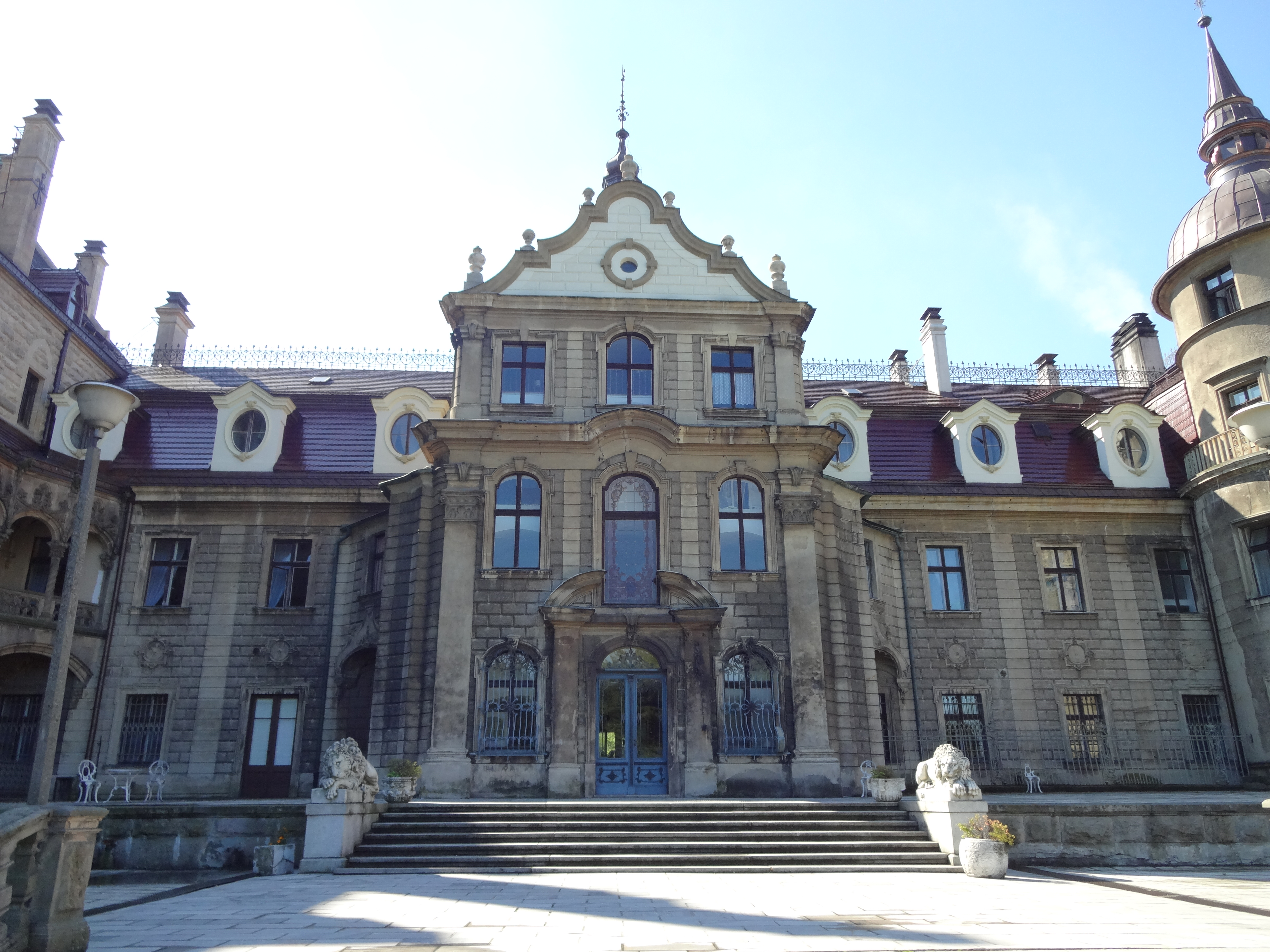 Moszna - zespół pałacowy: - pałac - oficyna - stajnie - wozownie - park (zabytek nr 681/63 z 24.06.1963)